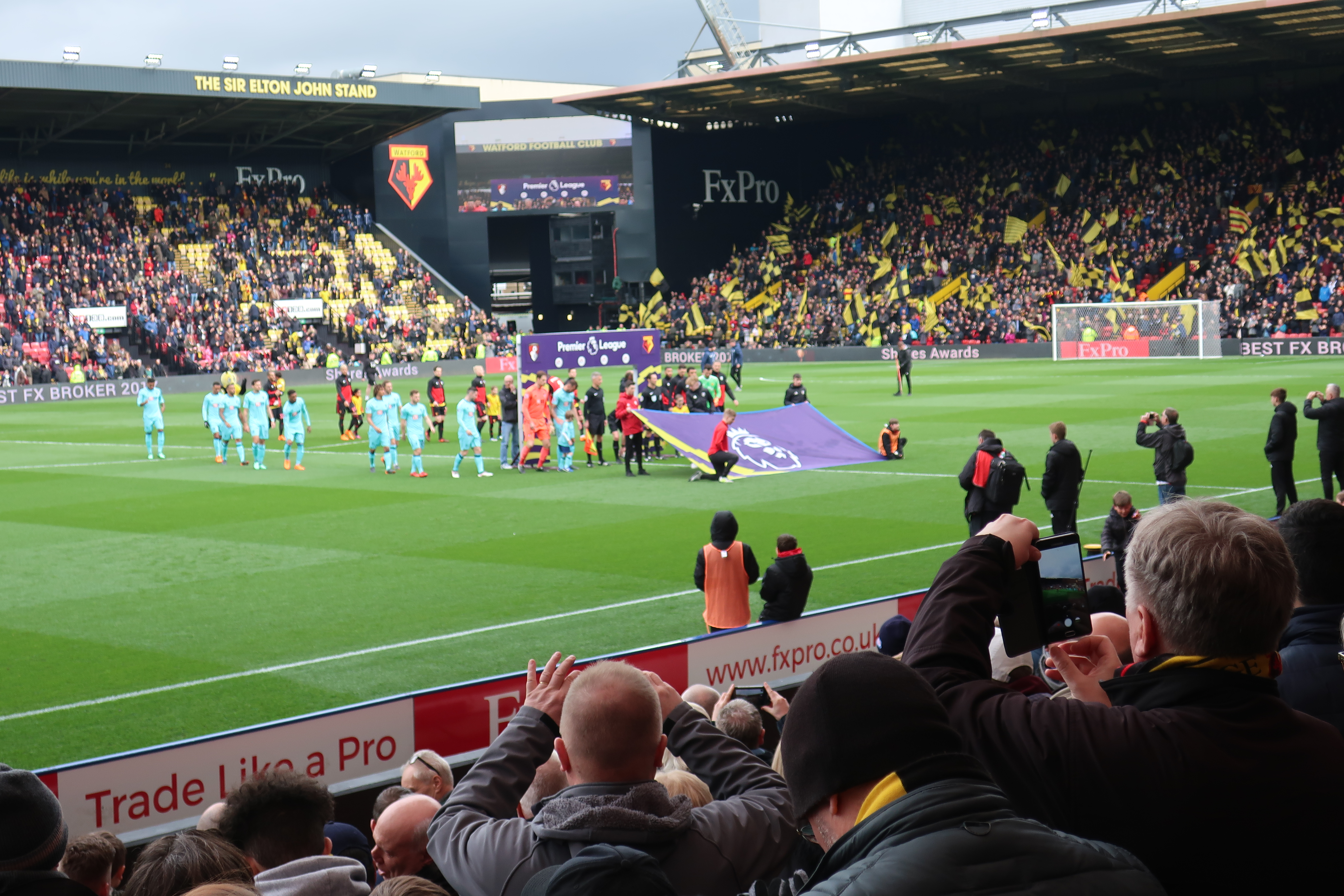 Valioliigaottelun Watford - Bournemouth alkuseremoniat 31.3.2018